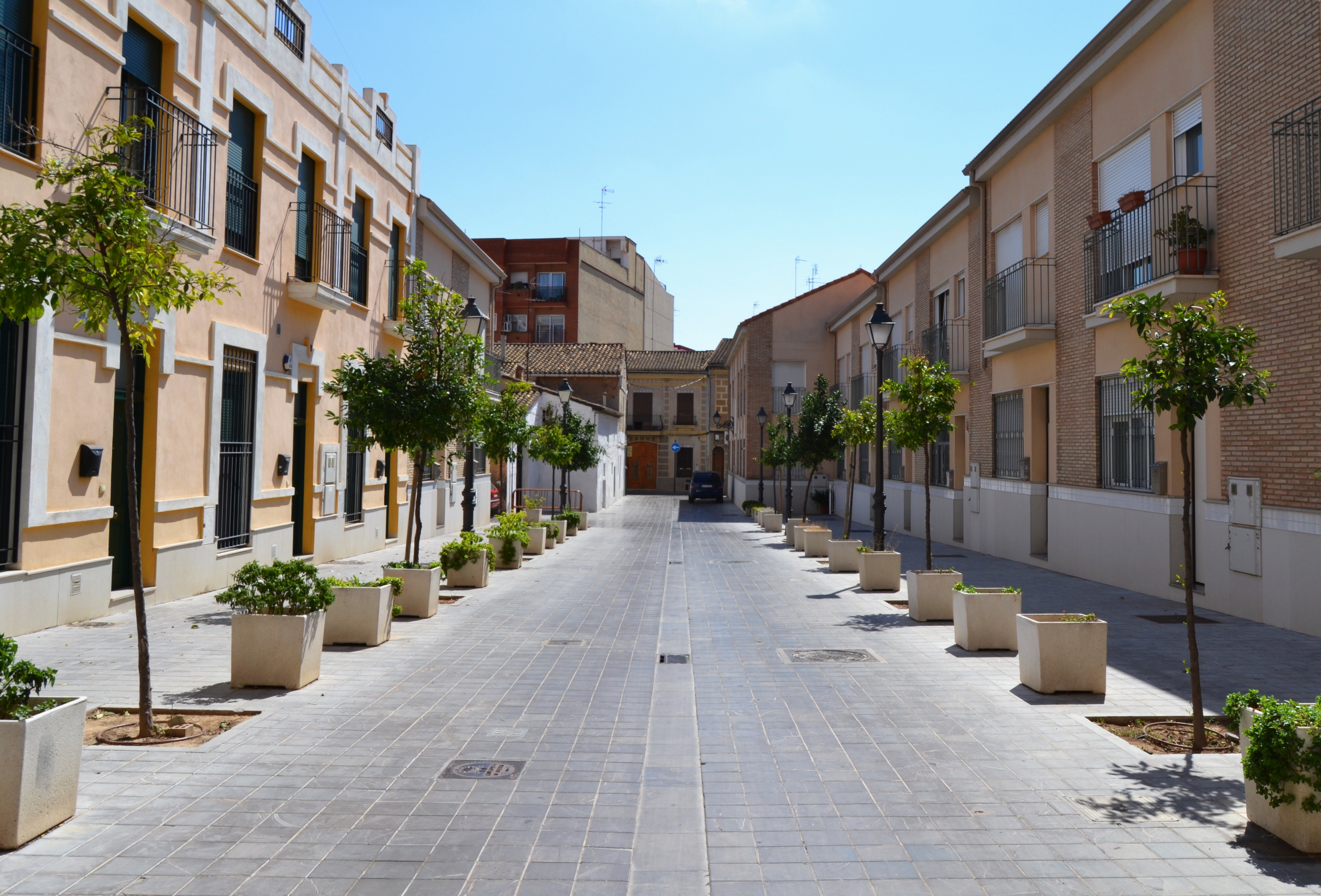 Carrer d'Amando Blanquer de Campanar.